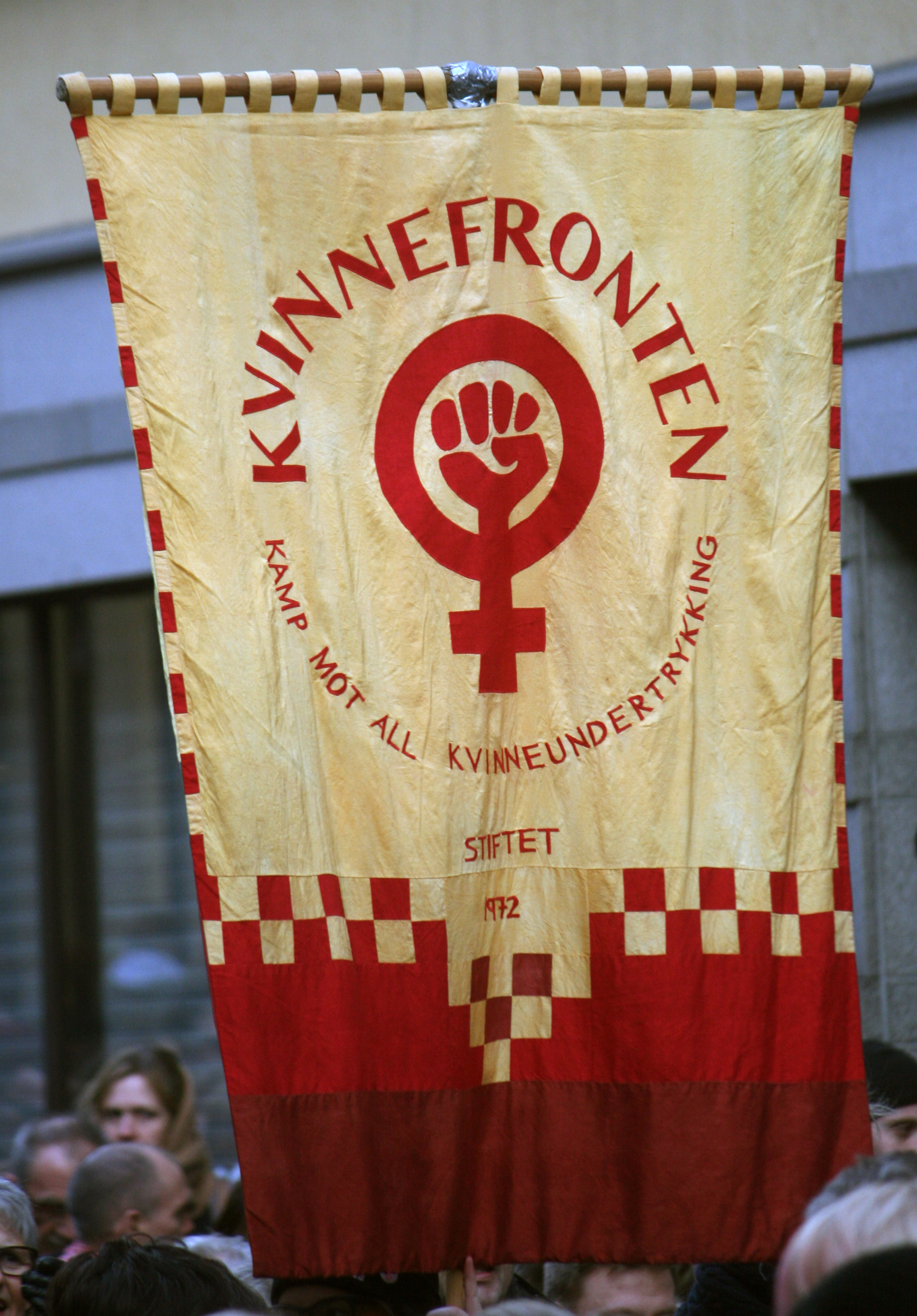 Fanen til den norske organisasjonen Kvinnefronten